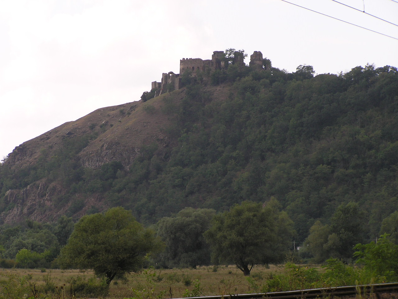 Burg Şoimoş bei Lipova (Arad), Rumänien